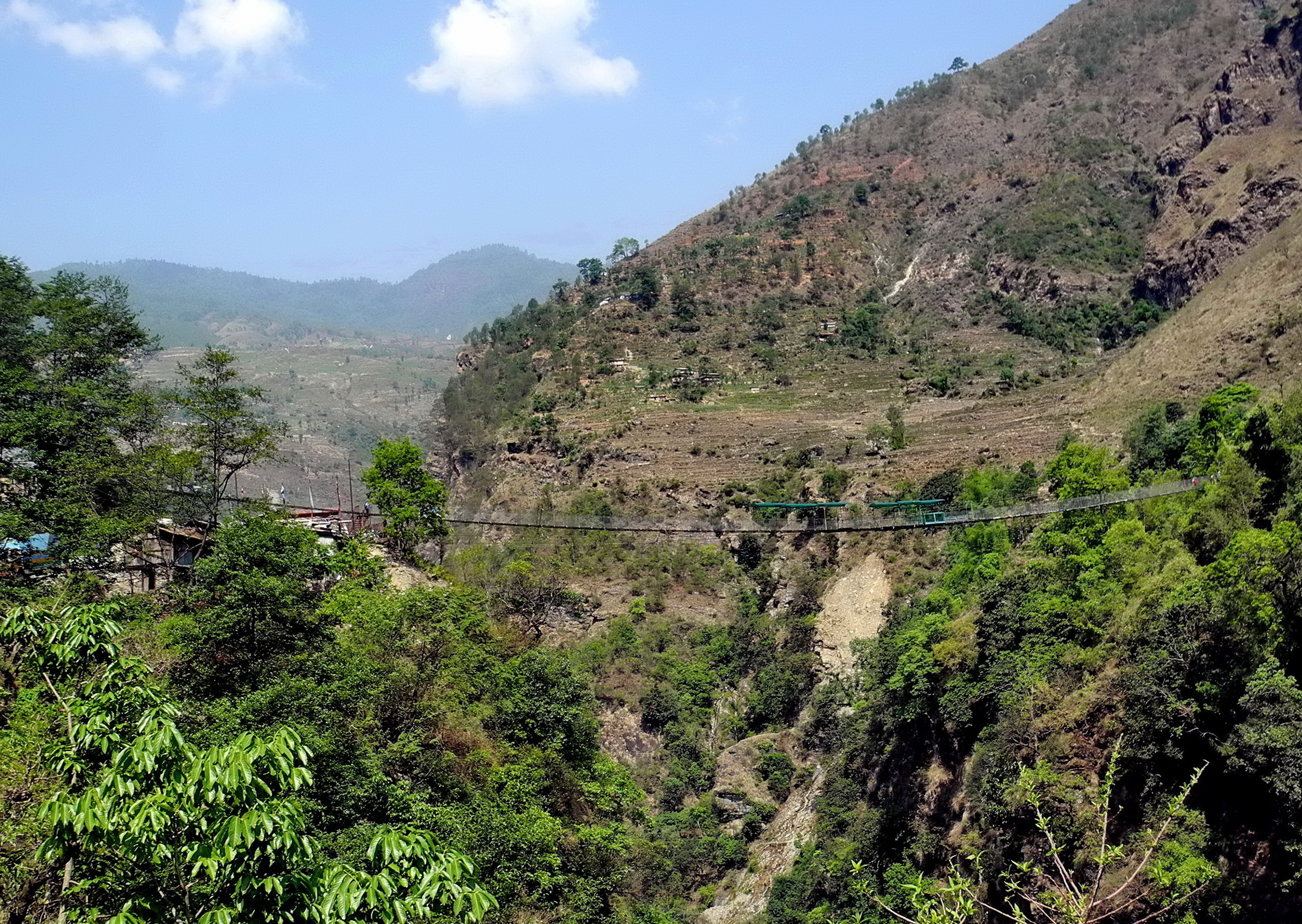 Arniko Highway : passerelle sur la Bothe-Kosi river